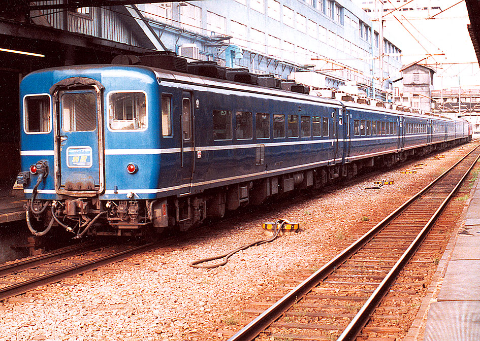 国鉄14系客車 急行「利尻」